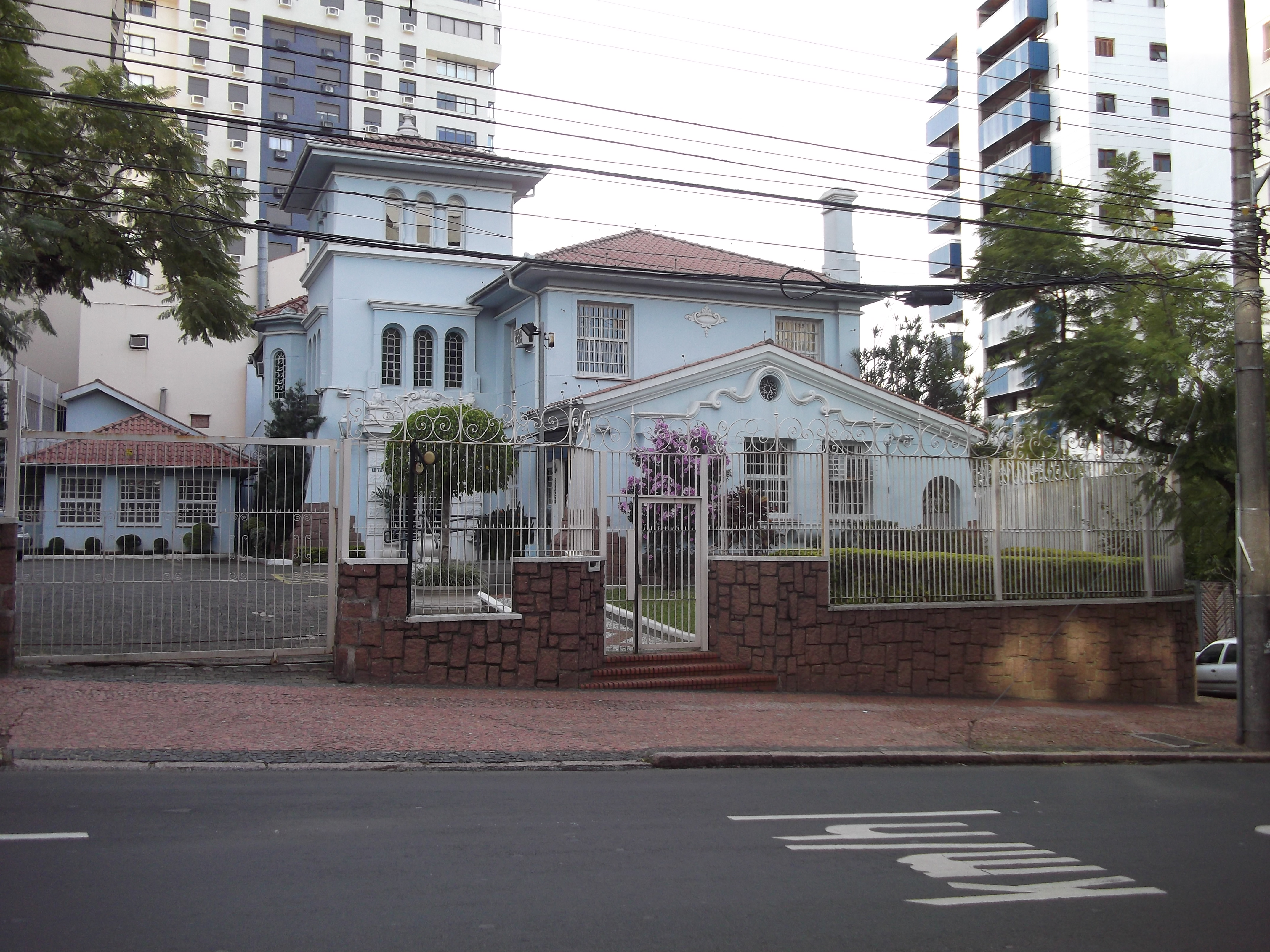 Rua Ramiro Barcelos n1274, Porto Alegre, Brasil